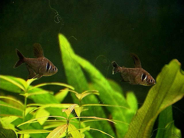 Tetra fantome